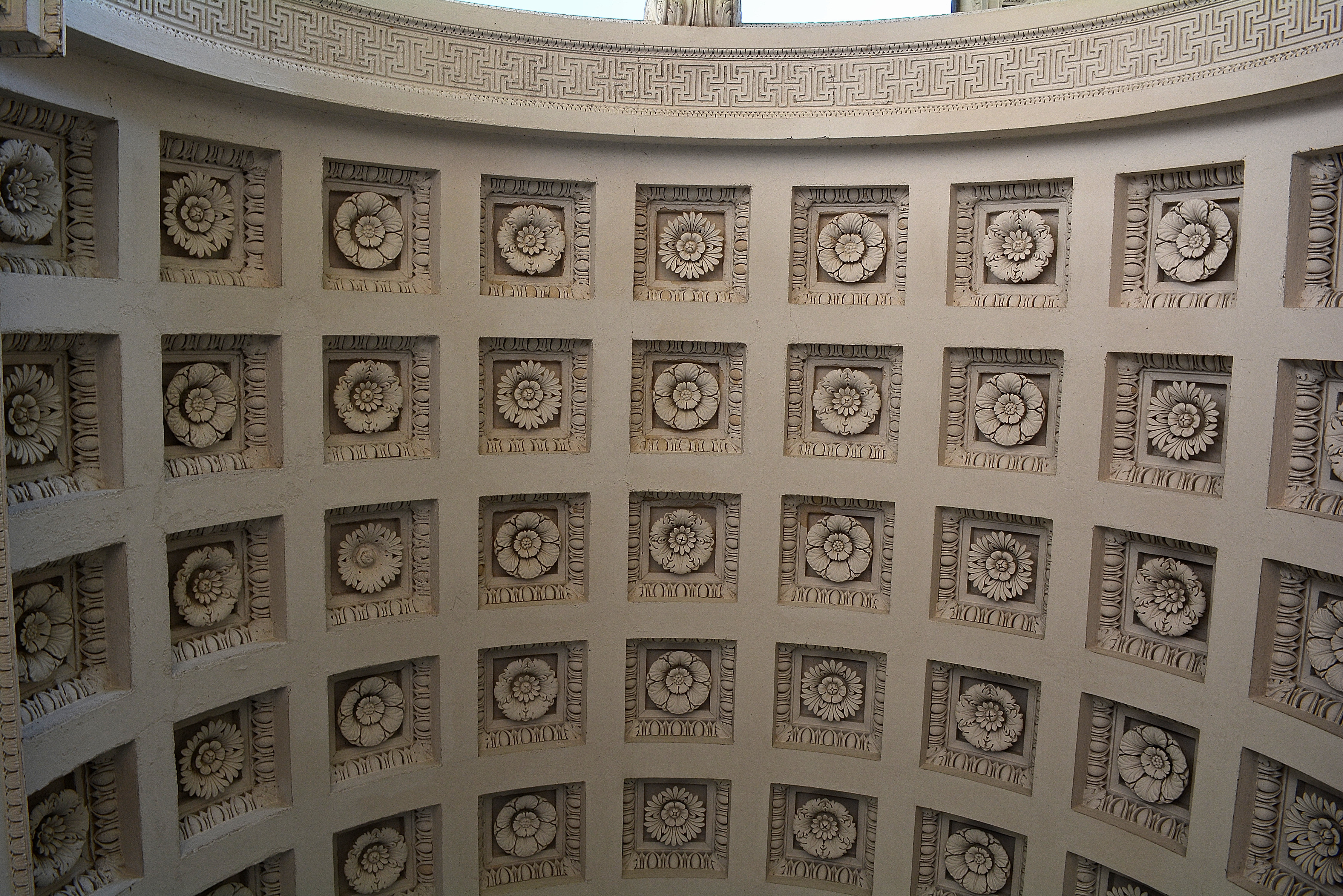 Parco e Villa Pallavicini This is a photo of a monument which is part of cultural heritage of Italy.